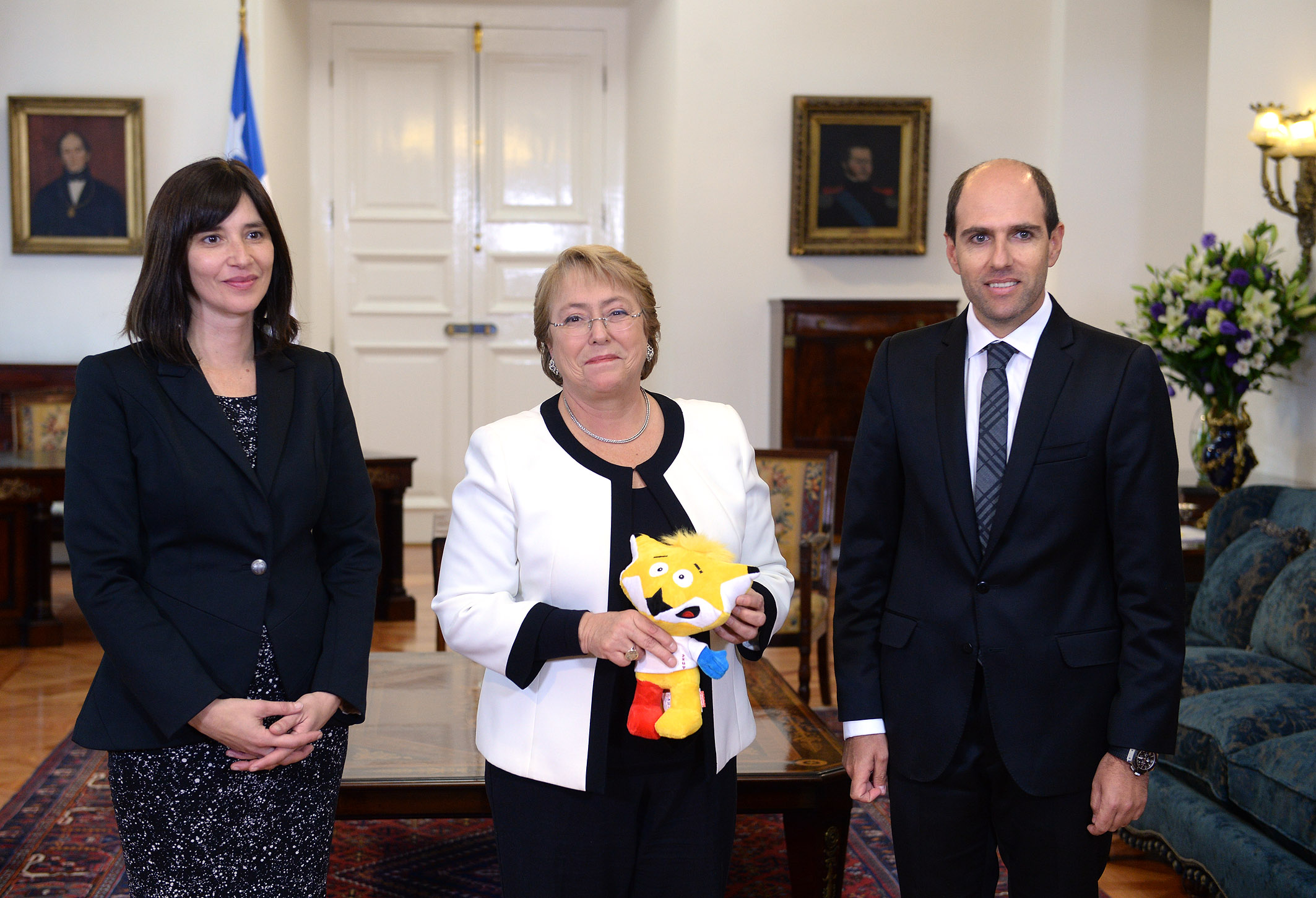 Gobierno de Chile